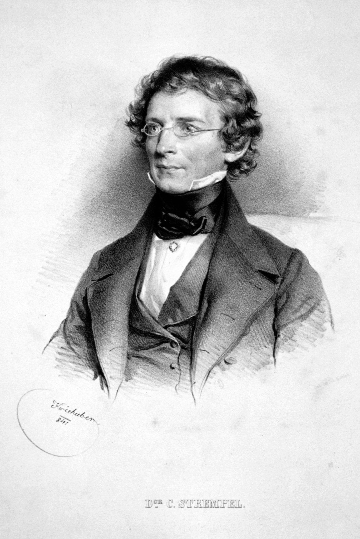 Dr. C. Strempel (1800-1877), Augenarzt Lithographie von Josef Kriehuber, 1841